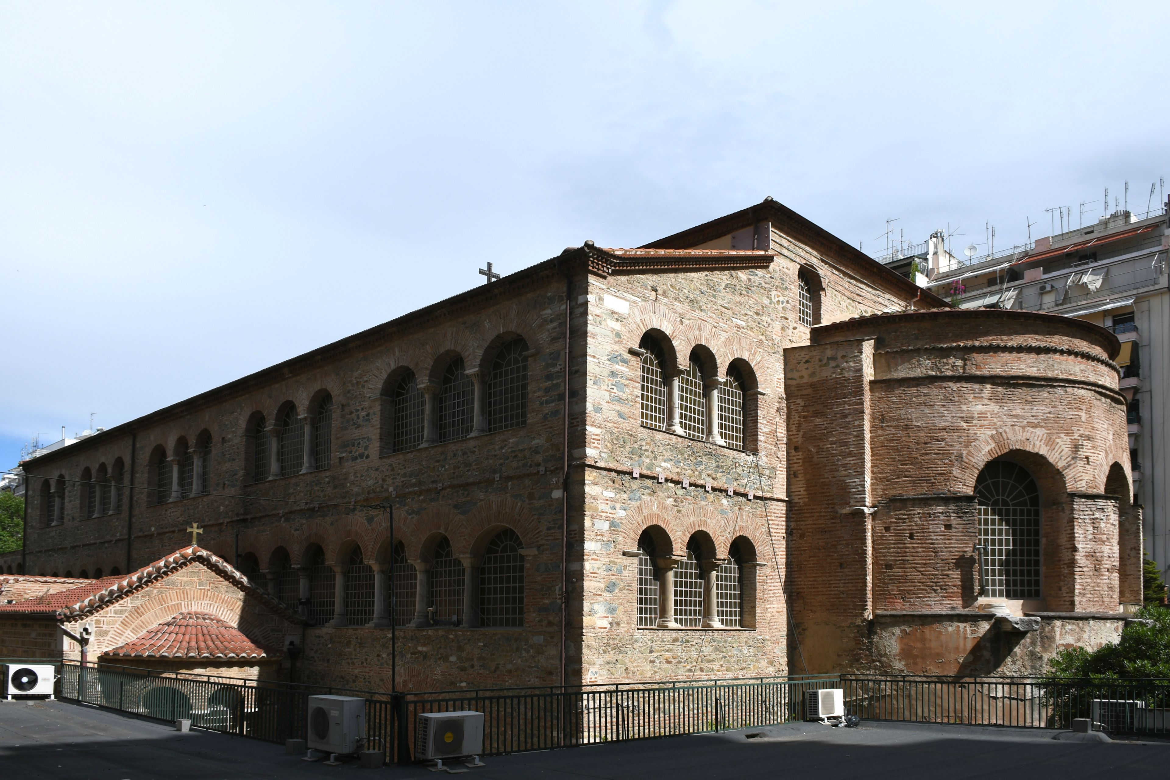 Thessaloniki, Panagia Acheiropoietos / Παναγία Αχειροποίητος (5. Jhdt.)